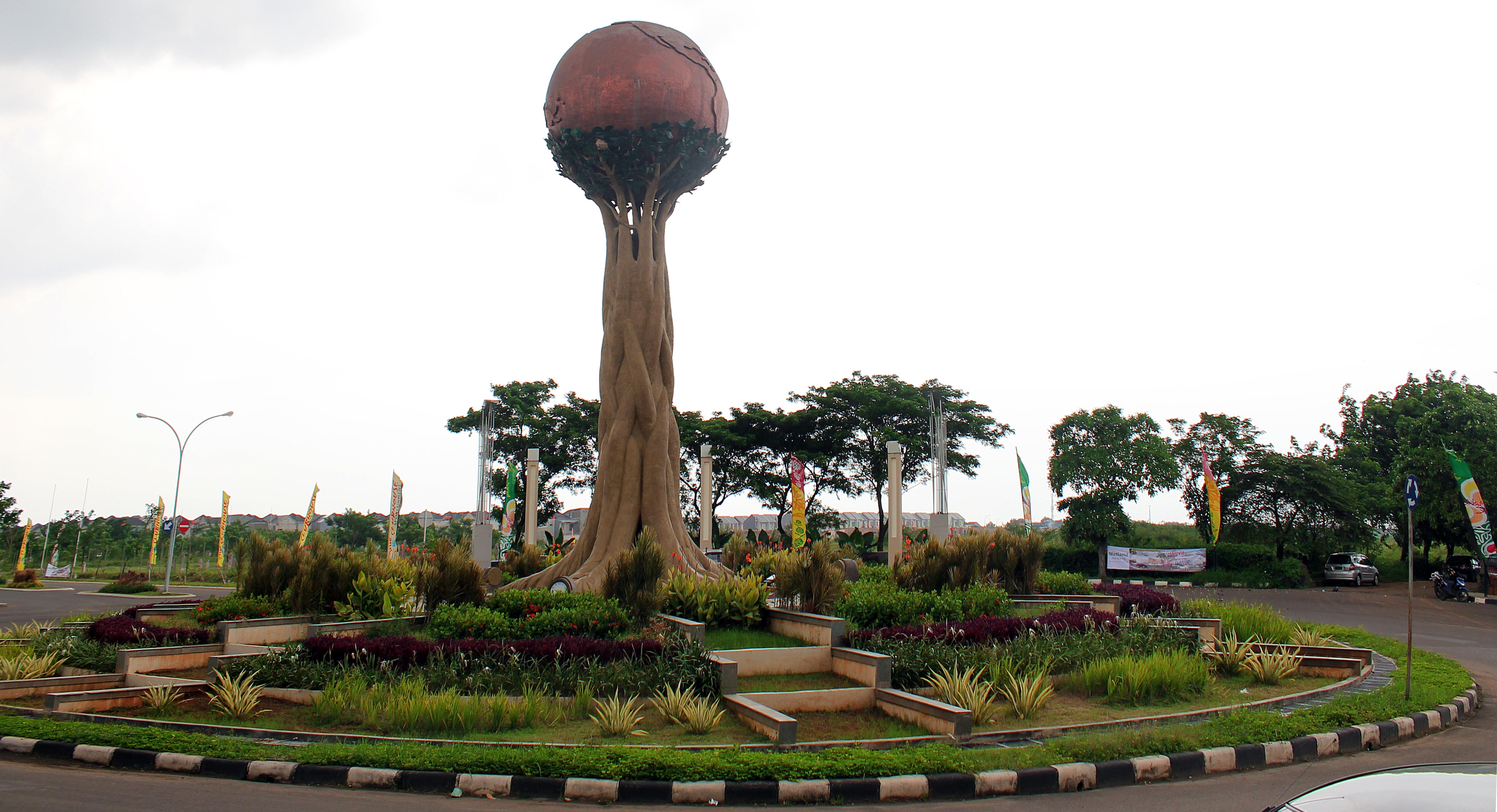 Bundaran MetLand Regency (2012), Cakung